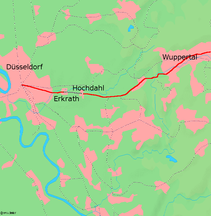 Karte der Stammstrecke der Bergisch-MÃ¤rkischen Eisenbahn mit eingezeichneter Steilrampe Erkrath-Hochdahl, Kartenquelle: [1] Benutzer:Markus SchweiÃŸ